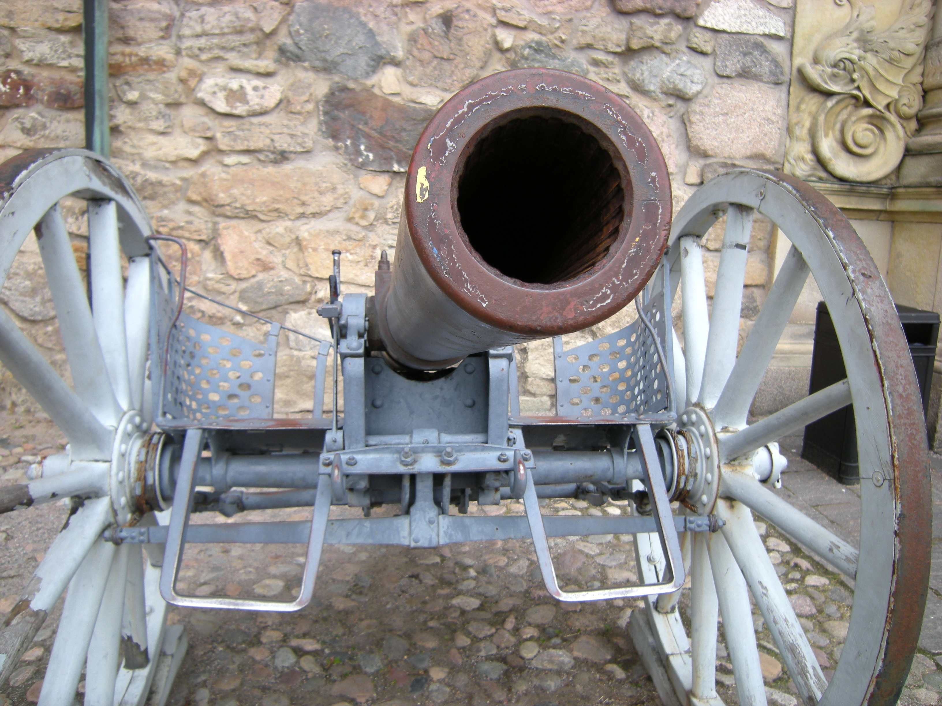 8,4 cm kanon av Krupps modell tillverkad av Bofors 1889 vid ingången till Örebro slott.